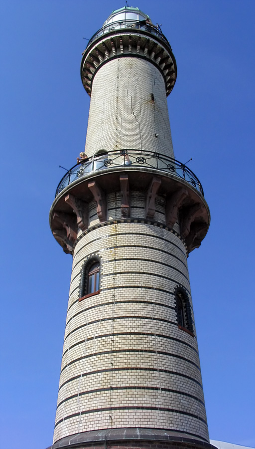 Beschreibung: Daten des Leuchtturms Standort: 54°11'N (Nördliche Breite), 12°05'E (östliche Länge) Erbaut 1897/98 Bauwerk: weißer runder Turm mit dunklen waagerechten Streifen und zwei Galerien Kennung: Blitzgruppe 3+1 weiß / Wiederkehr 24 Sekunden Feuerhöhe über Mittelwasser: 34,3 m Höhe über Fundament: 31 m Tragweite: 20 sm ~ 37 km Sichtweite: 16,7 sm ~ 30 km Laternentyp: Laterne mit kuppelförmigen Kupferdach Hauptlichtquelle: Spezialscheinwerferglühlampe 220 V / 1000 Watt Betreiber: Förderverein Leuchtturm Warnemünde e.V. Fotograf: Benutzer:Darkone, 5. September 2004